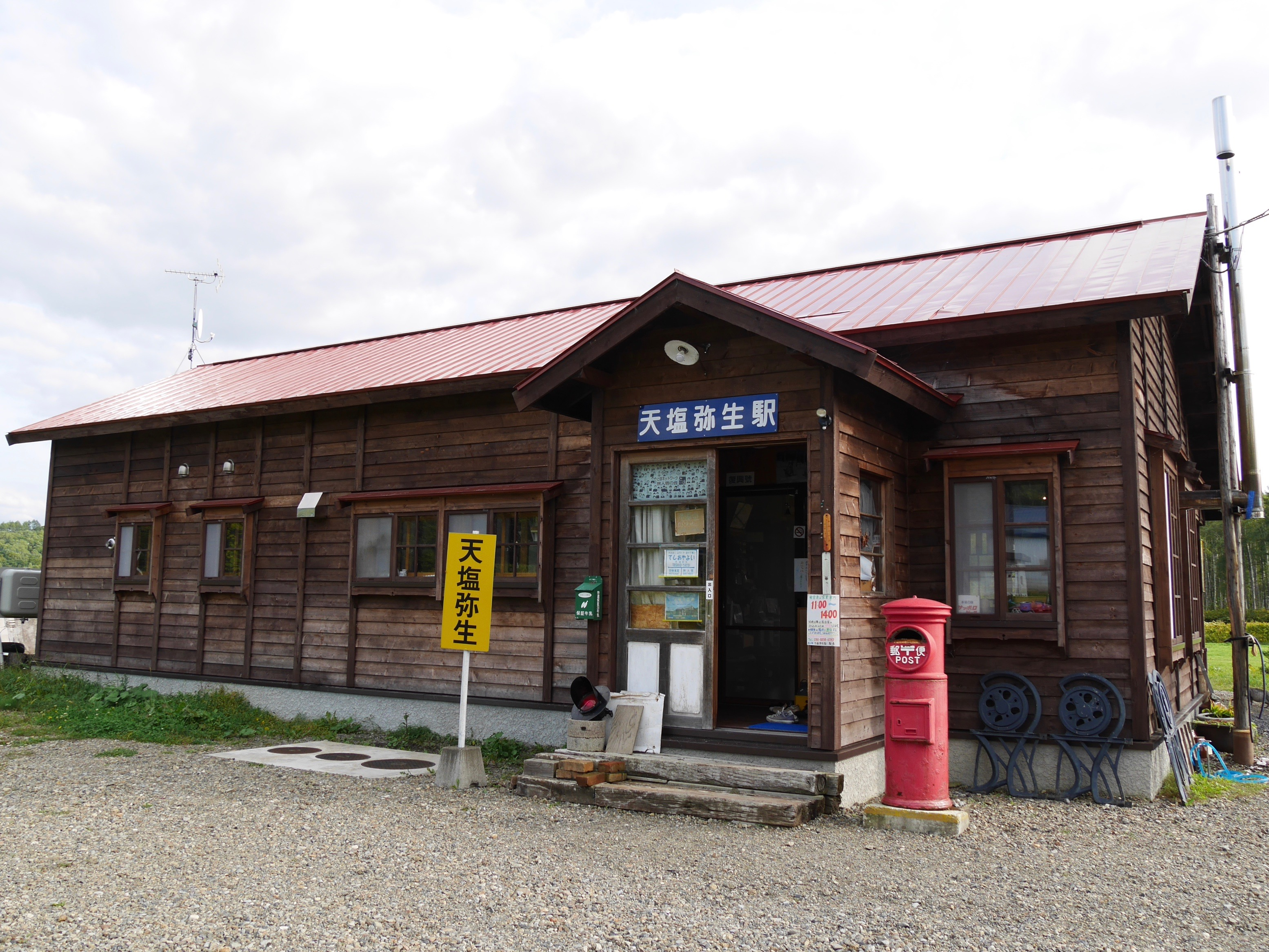 「天塩弥生駅」外観